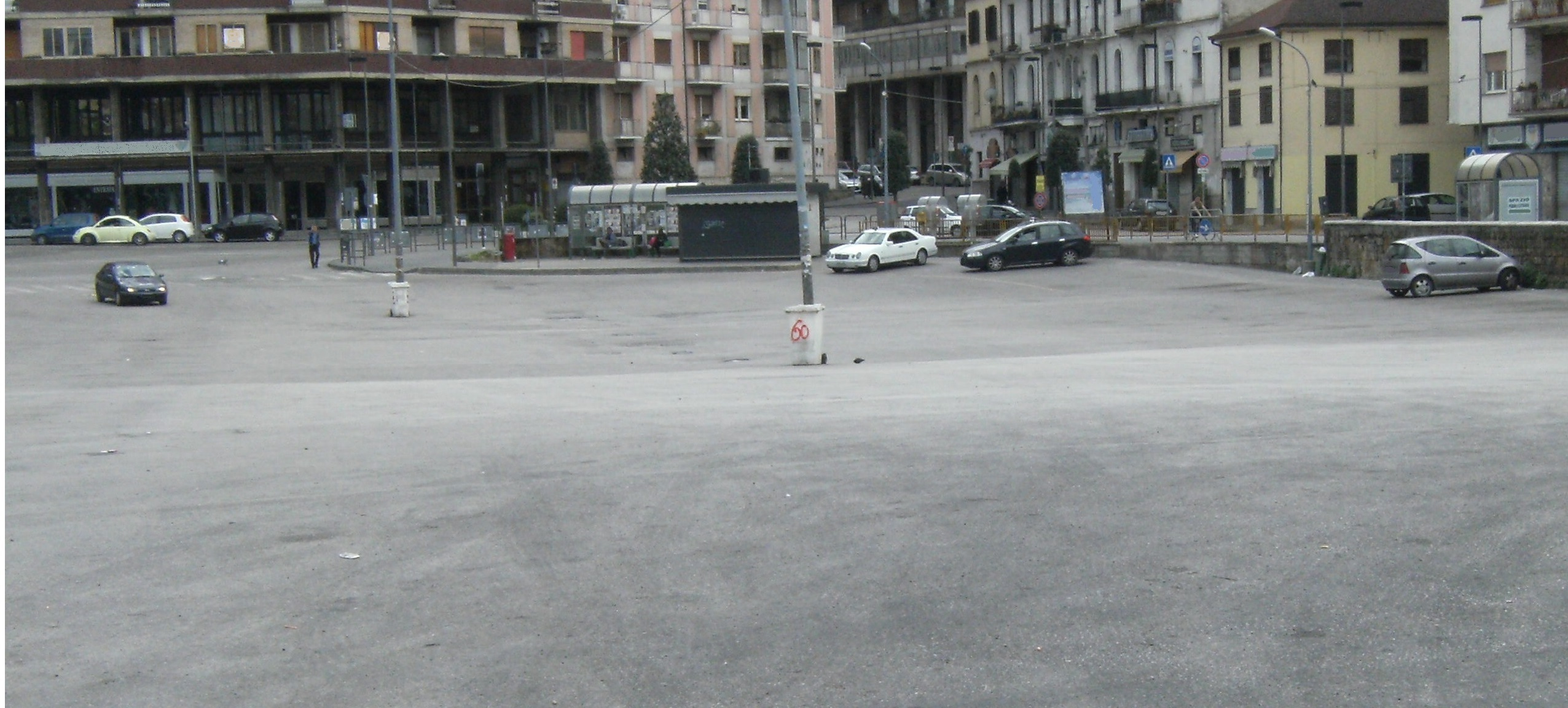 Terminal autobus - Piazza Kennedy (Area ex Macello) - Avellino